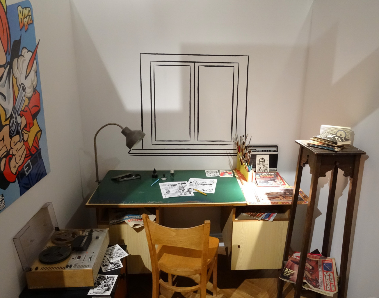 Rekonstrukcja warsztatu pracy rysownika komiksów Jerzego Wróblewskiego - wystawa Muzeum Okręgowego im. Leona Wyczółkowskiego w Bydgoszczy w spichrzach przy ul. Grodzkiej - Noc Muzeów 2015